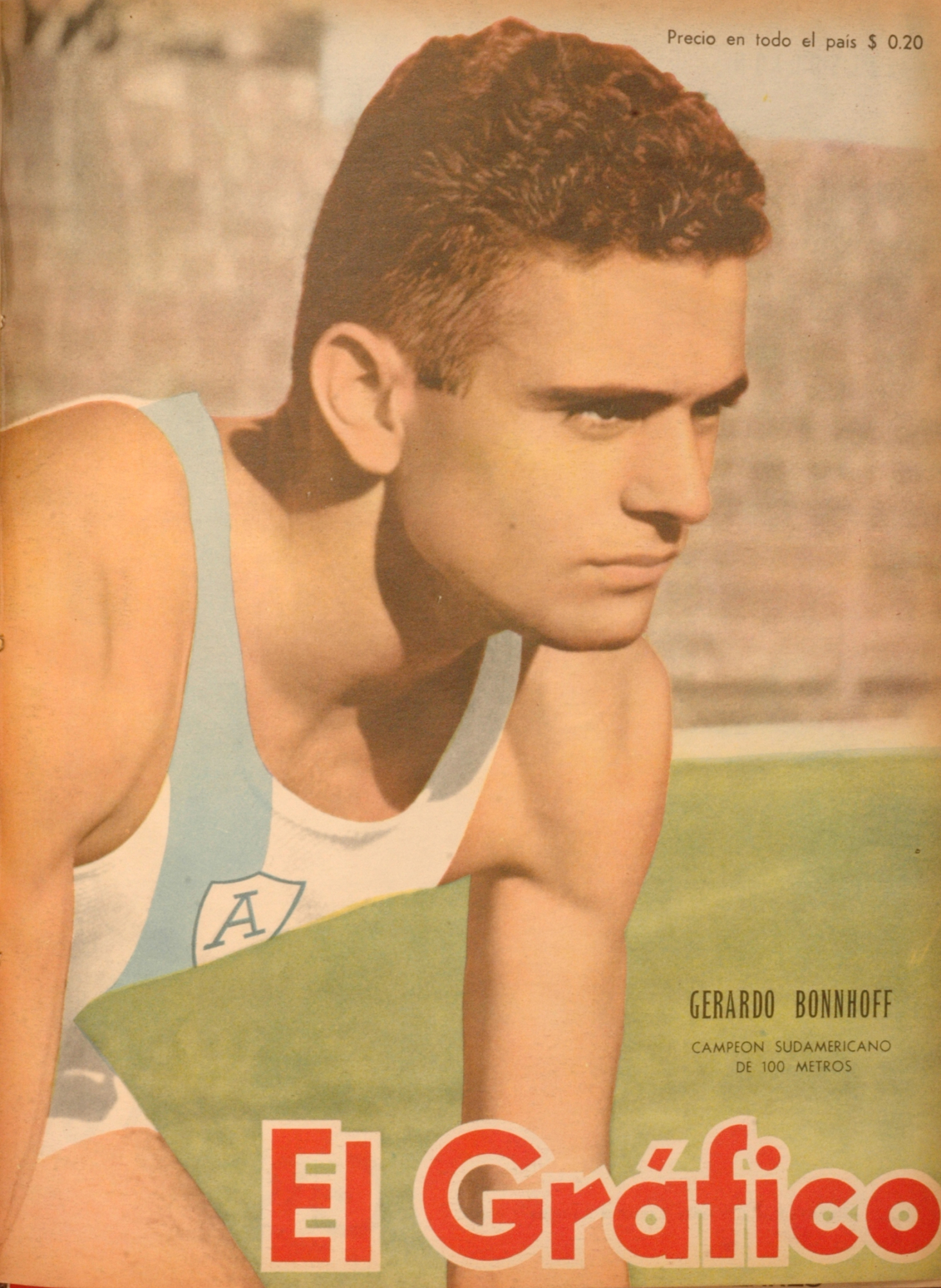 El Grafico del 30 de Mayo de 1947. Edicion 1455